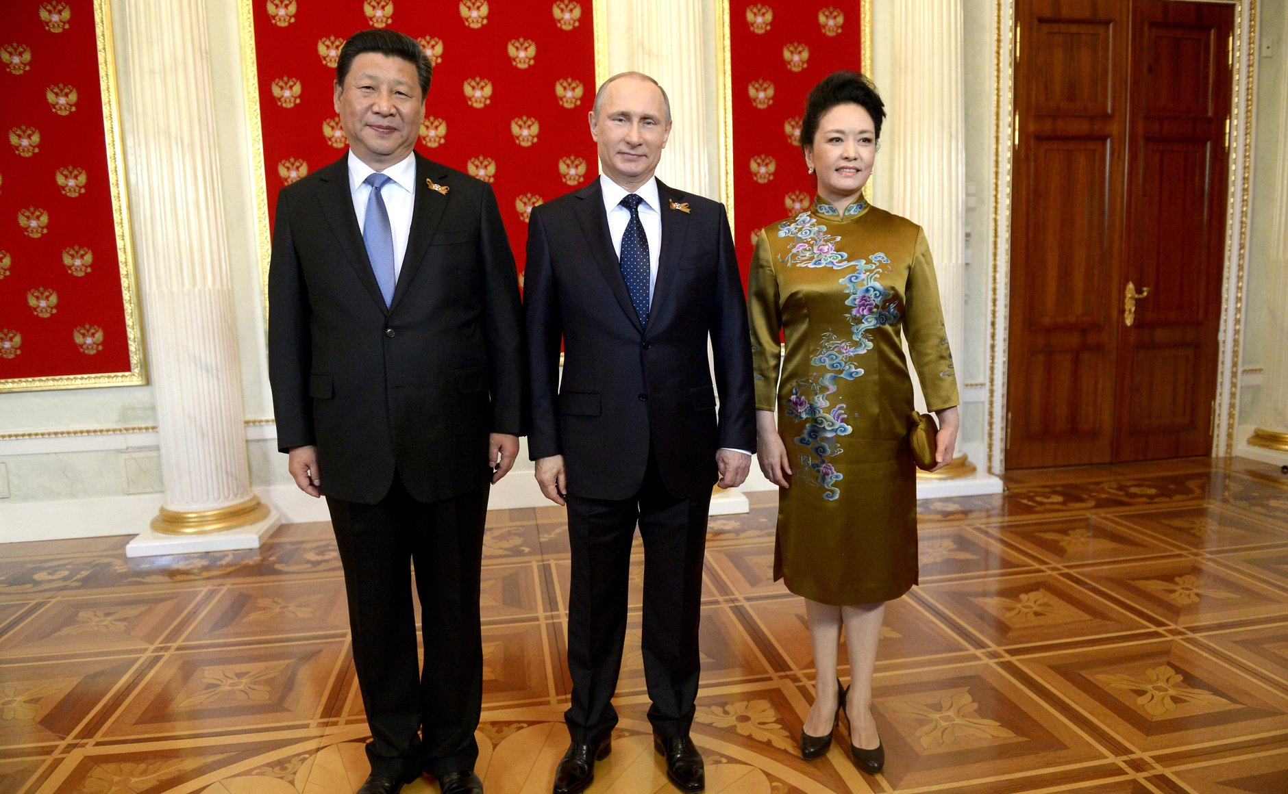 Перед началом парада Владимир Путин в Гербовом зале Кремля приветствовал лидеров иностранных государств и крупнейших международных организаций, прибывших в Москву для участия в праздничных мероприятиях. С Председателем КНР Си Цзиньпином и его супругой.